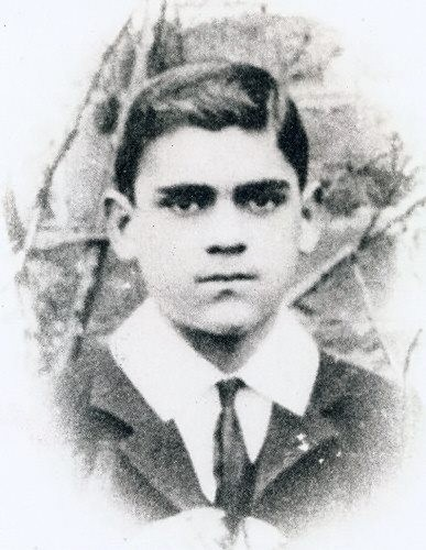 Уи́льям Ге́нри Пратт более известный под псевдонимом Борис Карлофф в 11 года, 1899 год.